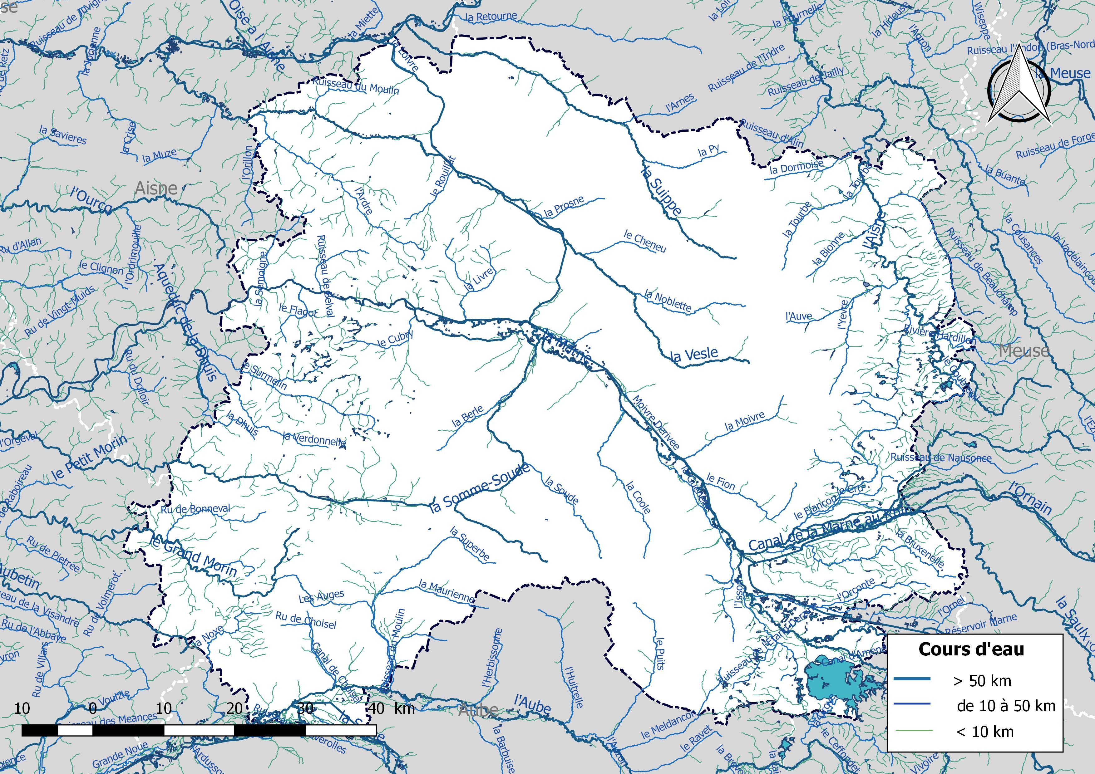 Réseau hydrographique du département de la Marne (France).